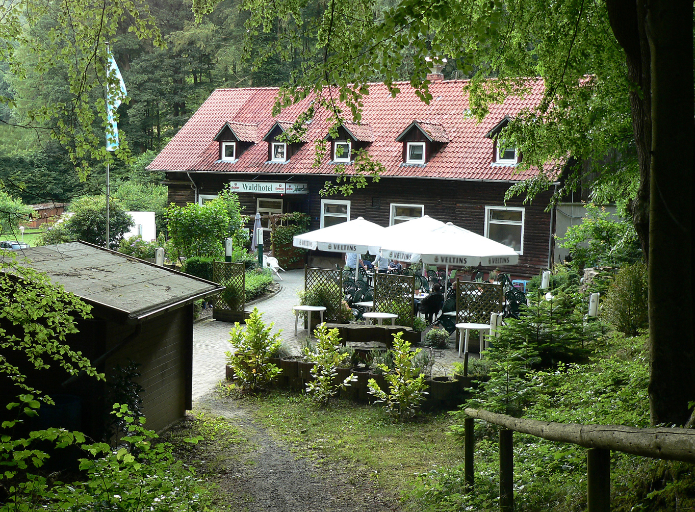 Hotel Jagdhaus Heede in Hann. Münden